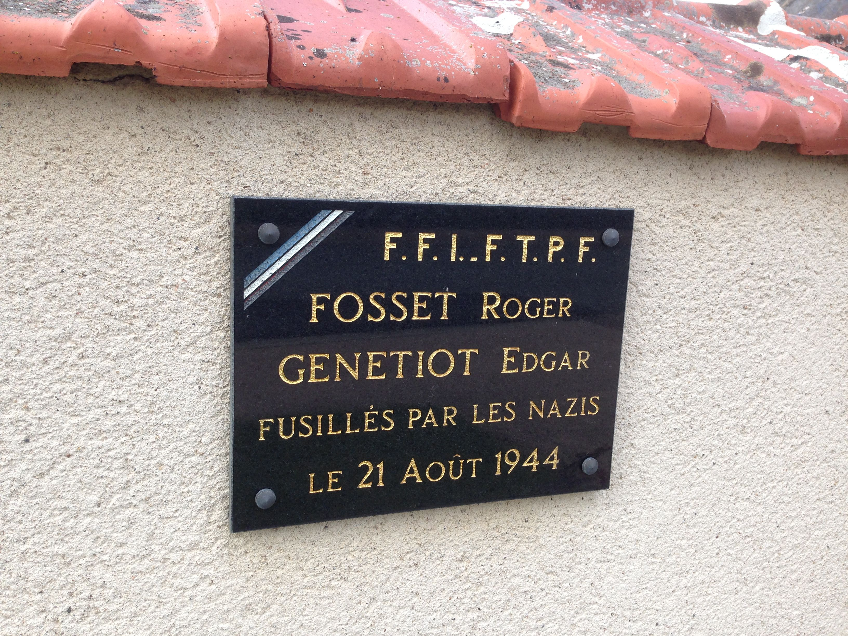 Beddes (Cher). Plaque commémorant le 21 août 44, près de l'église